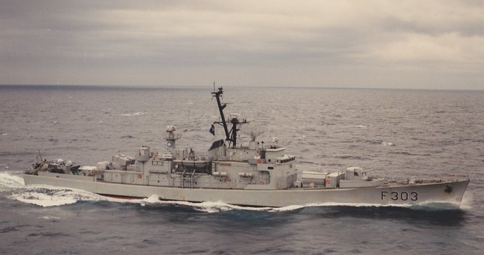 KNM Stavanger